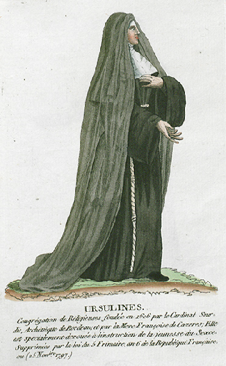 Collection de costumes de tous les ordres monastiques, supprimés à differentes époques, dans la ci-devant Belgique, Bruxelles, Philippe Joseph Maillart et sœur, 1811